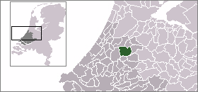 Location of Alphen aan den Rijn